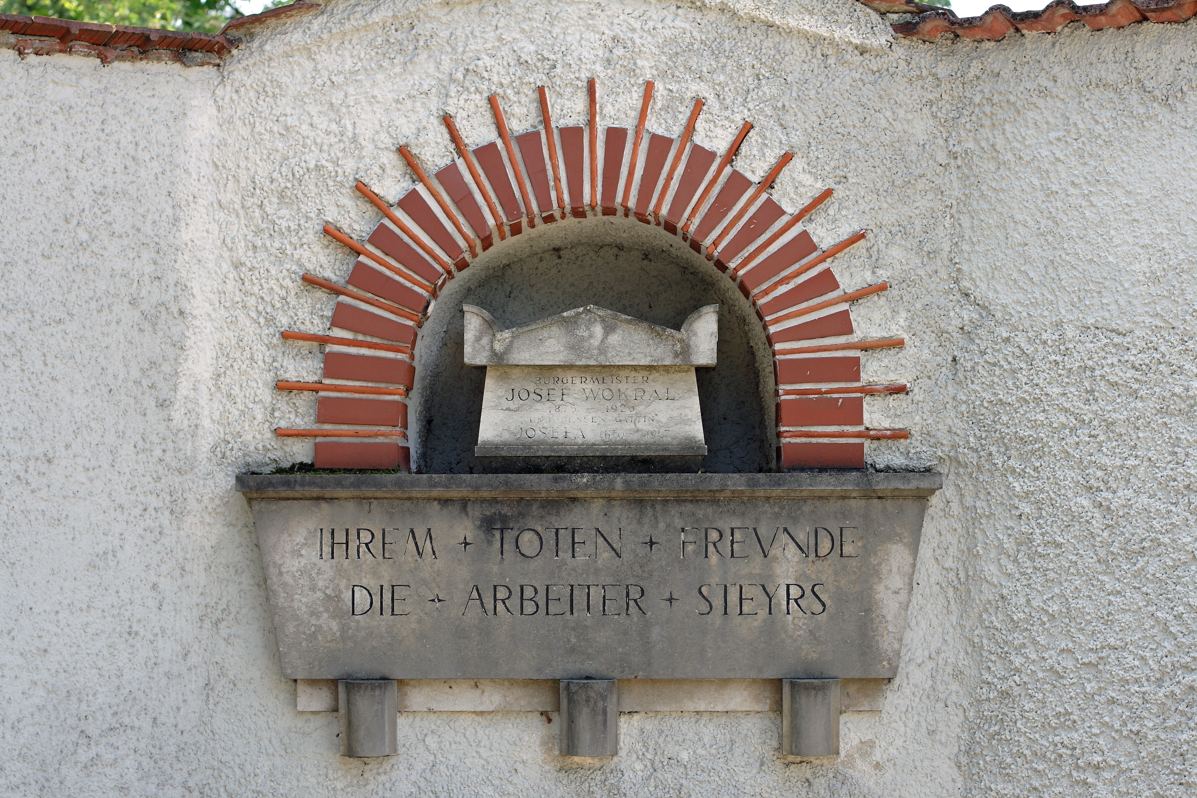 Das Ehrengrab des Steyrer Bürgermeisters Josef Wokral (1875–1926) und seiner Ehefrau Josefa (1876–1947) am Städtischen Urnenfriedhof am Tabor